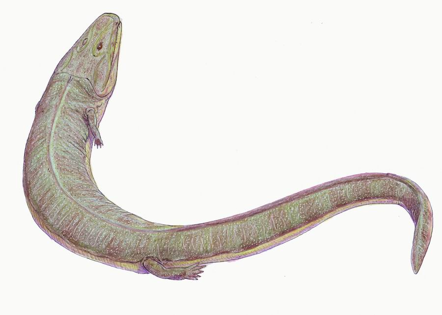 Грирерпетон — из группы колостеид.